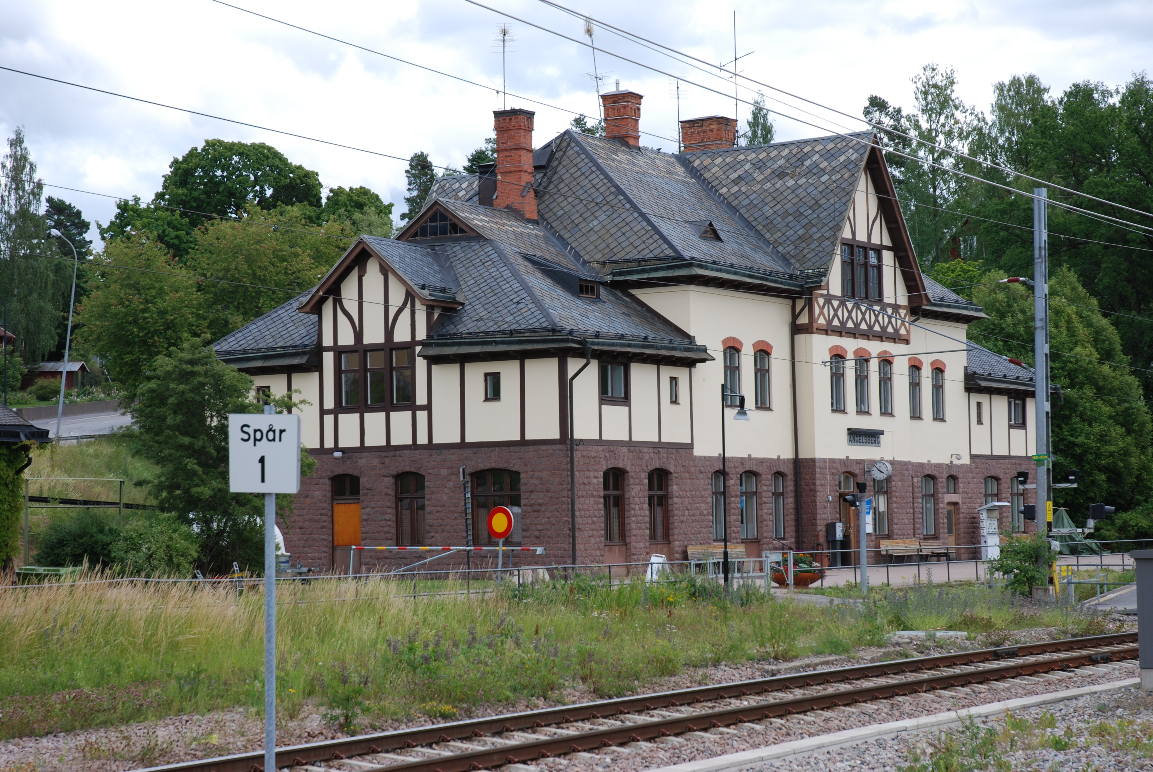 Ängelsberg Railway Station, Sweden, architect: Erik Lallerstedt, 1900. Photo: Bengt Oberger